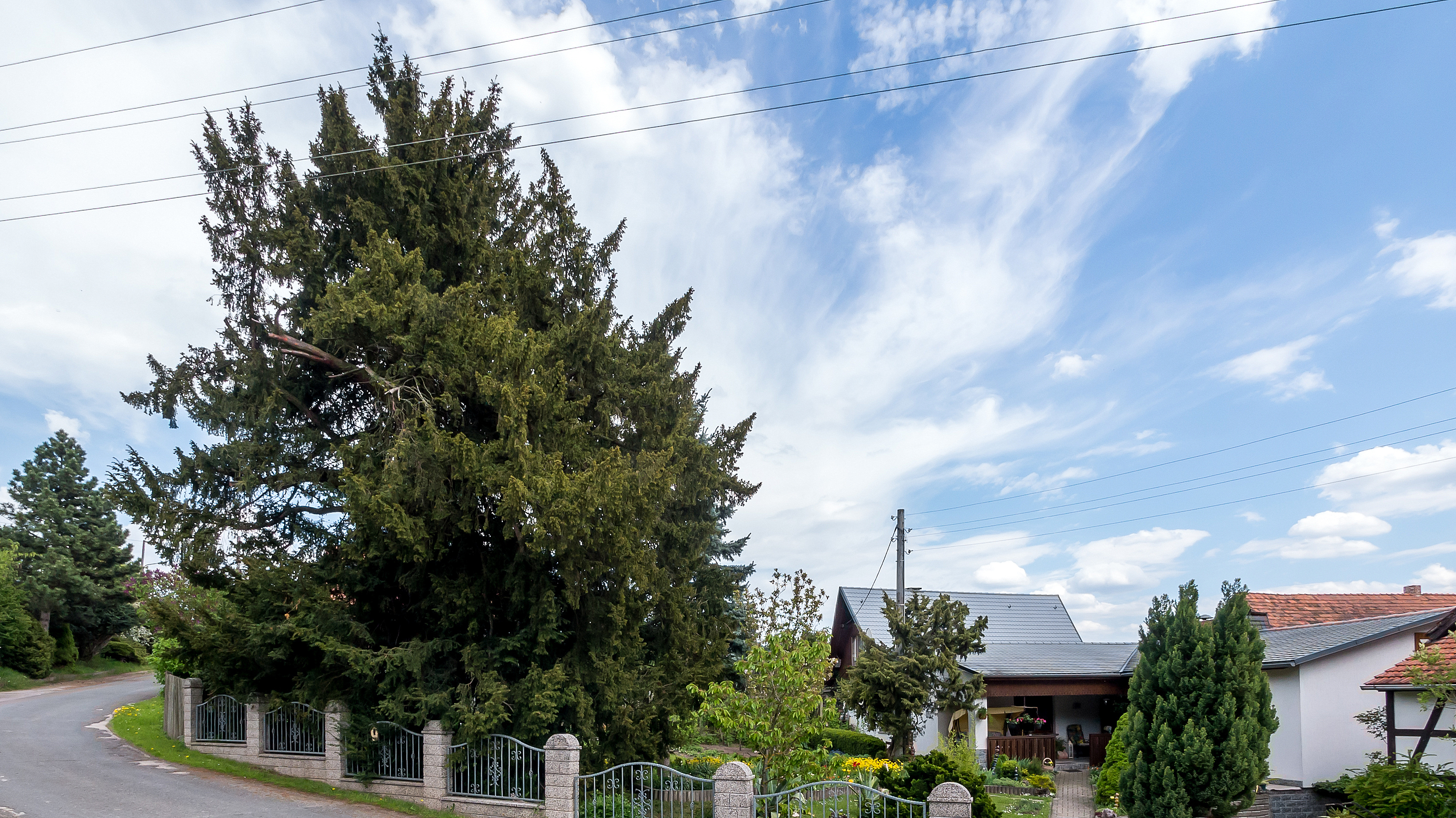 Eibe Listen Nr, 6 Milbitz bei Teichel II